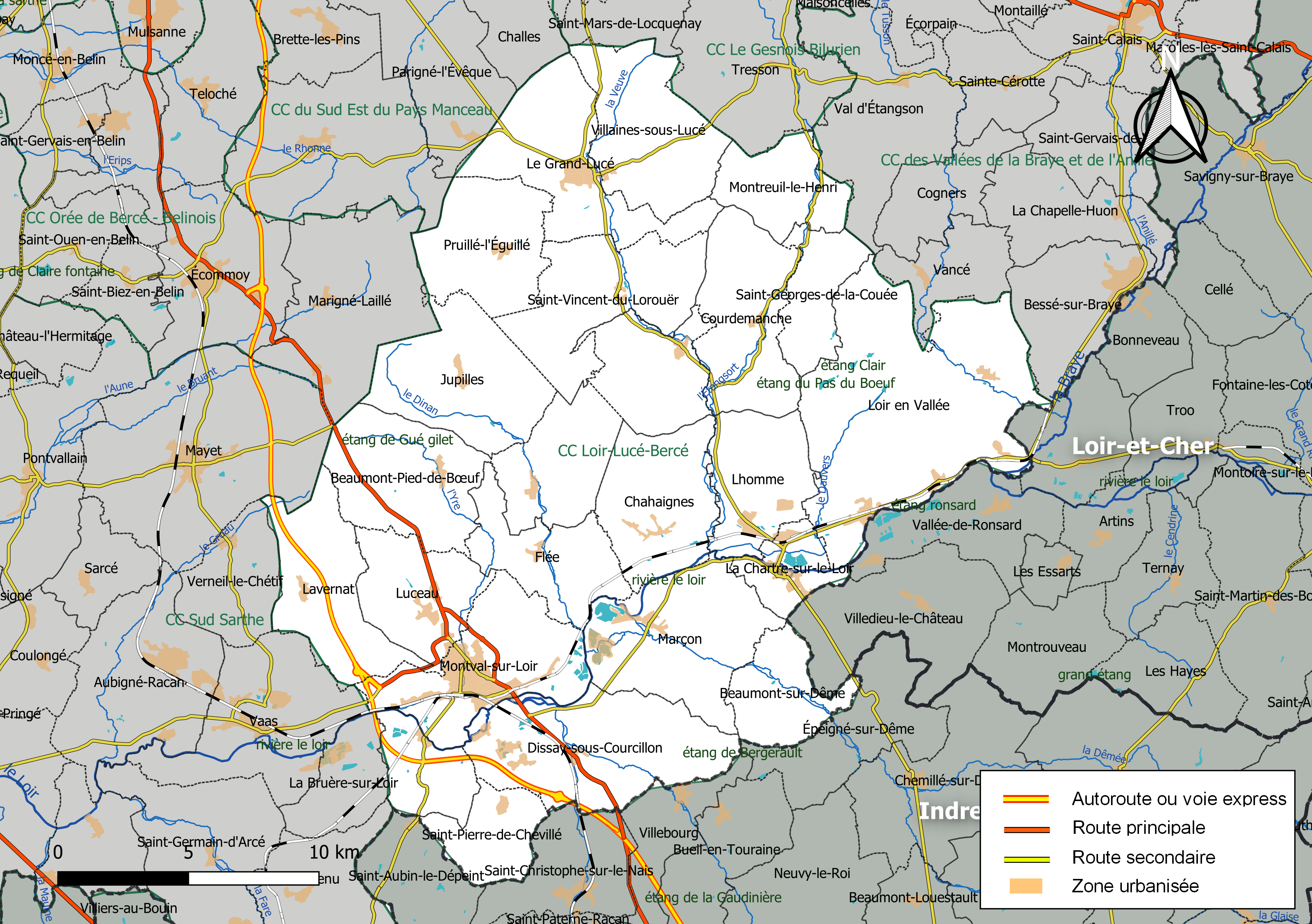 Carte géographique de la Communauté de communes Loir-Lucé-Bercé, département de la Sarthe, France. Composition au 1er janvier 2019.